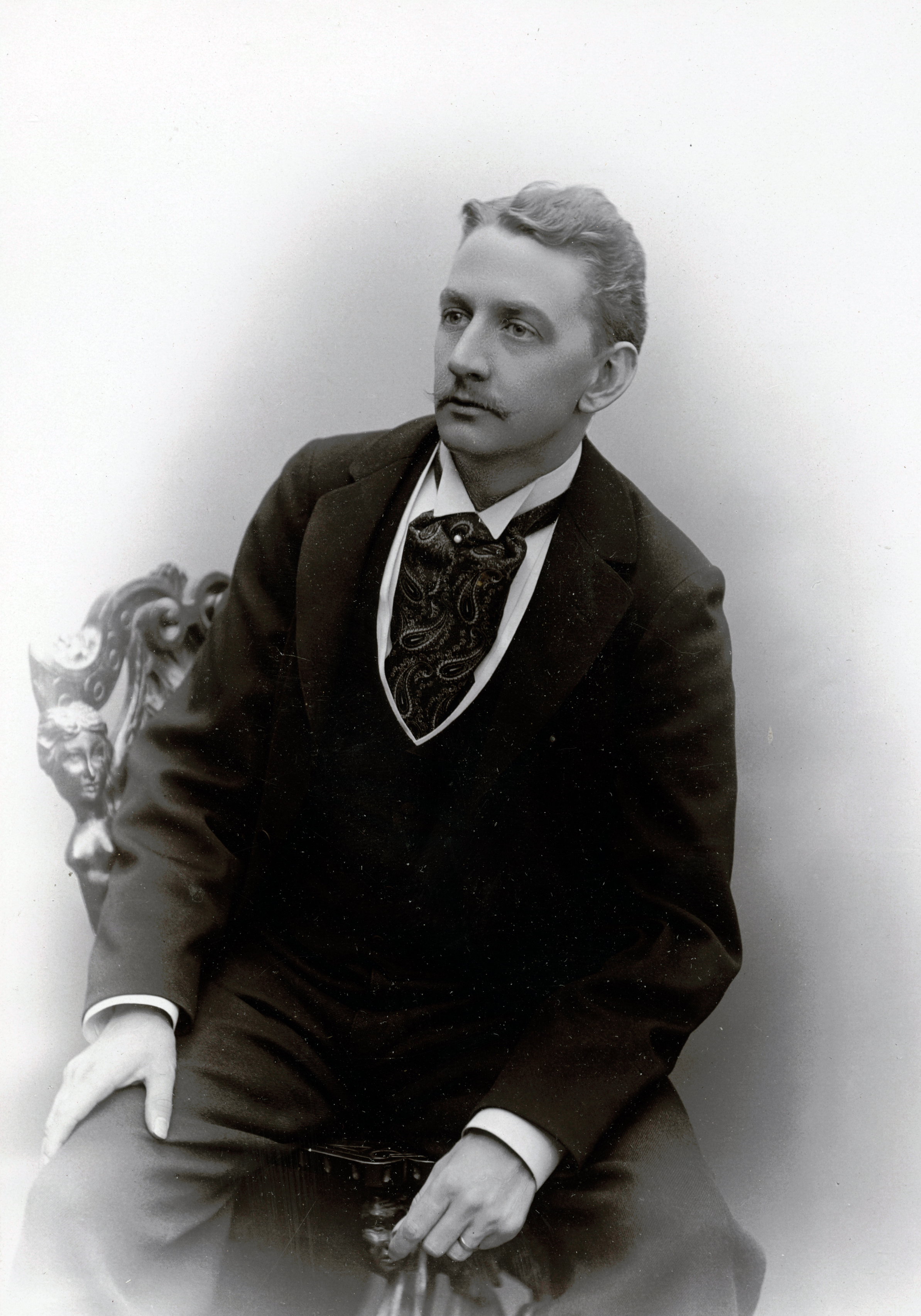 Knut Lambert, skådespelare vid Södra teatern 1895-96